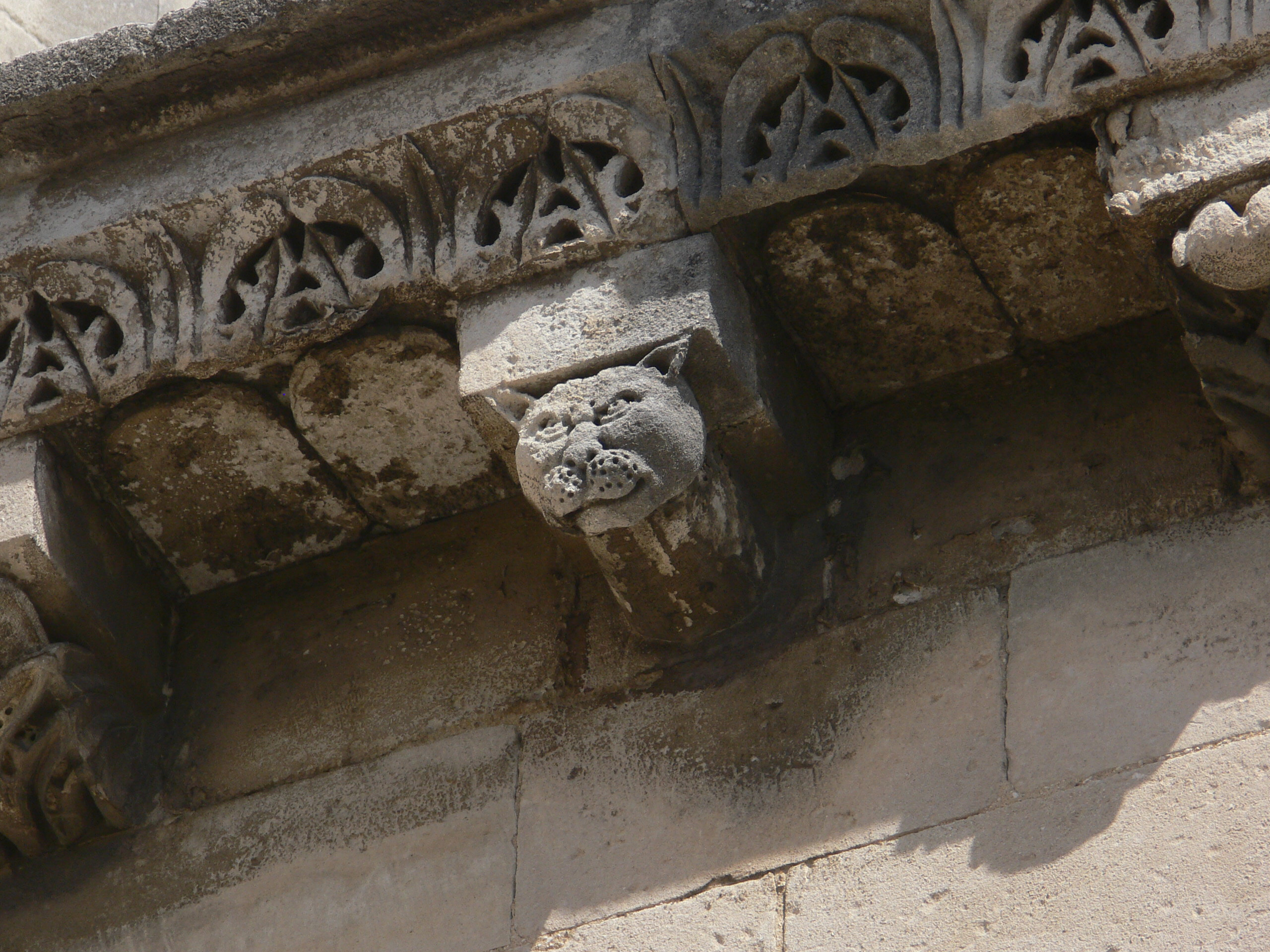 Église de Saint-Restitut